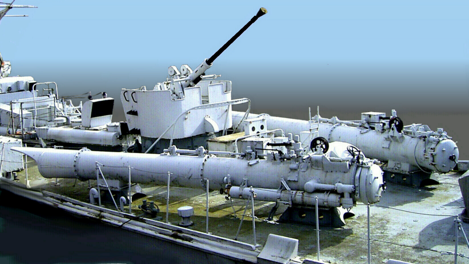 German Shipping Museum Native nameDeutsches SchifffahrtsmuseumParent institutionLeibniz AssociationLocationHans-Scharoun-Platz 1 27568 Bremerhaven GermanyCoordinates53° 32′ 24.36″ N, 8° 34′ 37.2″ E Established5 September 1975Web pageDeutsches SchifffahrtsmuseumAuthority control : Q455354 VIAF: 128715457 ISNI: 0000 0001 2256 5668 LCCN: n50065866 NLA: 35745010 GND: 2008892-9 WorldCat